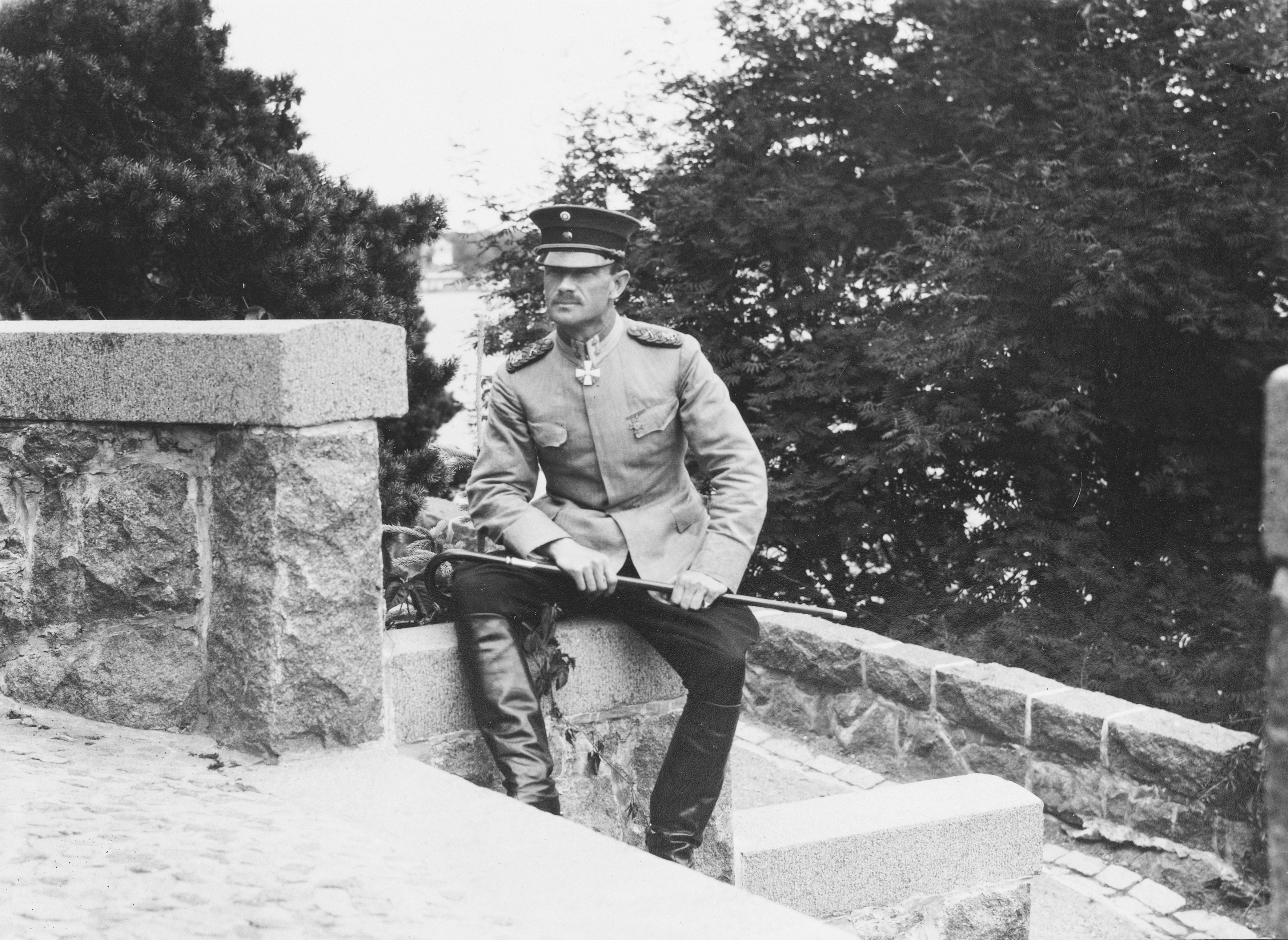 Tasavallan presidentin vanhempi adjutantti, everstiluutnantti Carl Bror Emil Aejmelaeus-Äimä (1882–1935) Naantalin Kultarannassa.